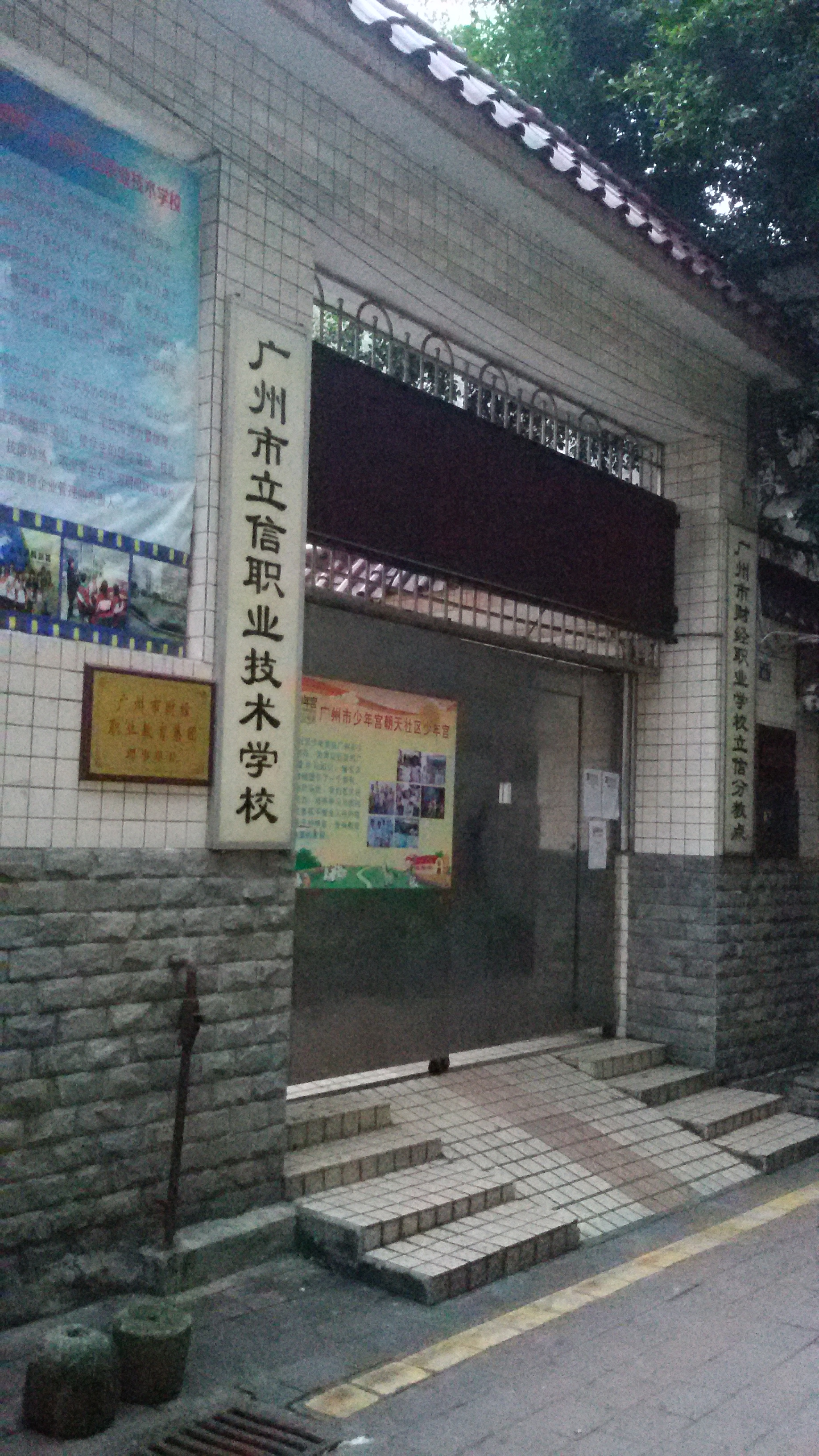 粵語: 廣州市立信職業技術學校大門